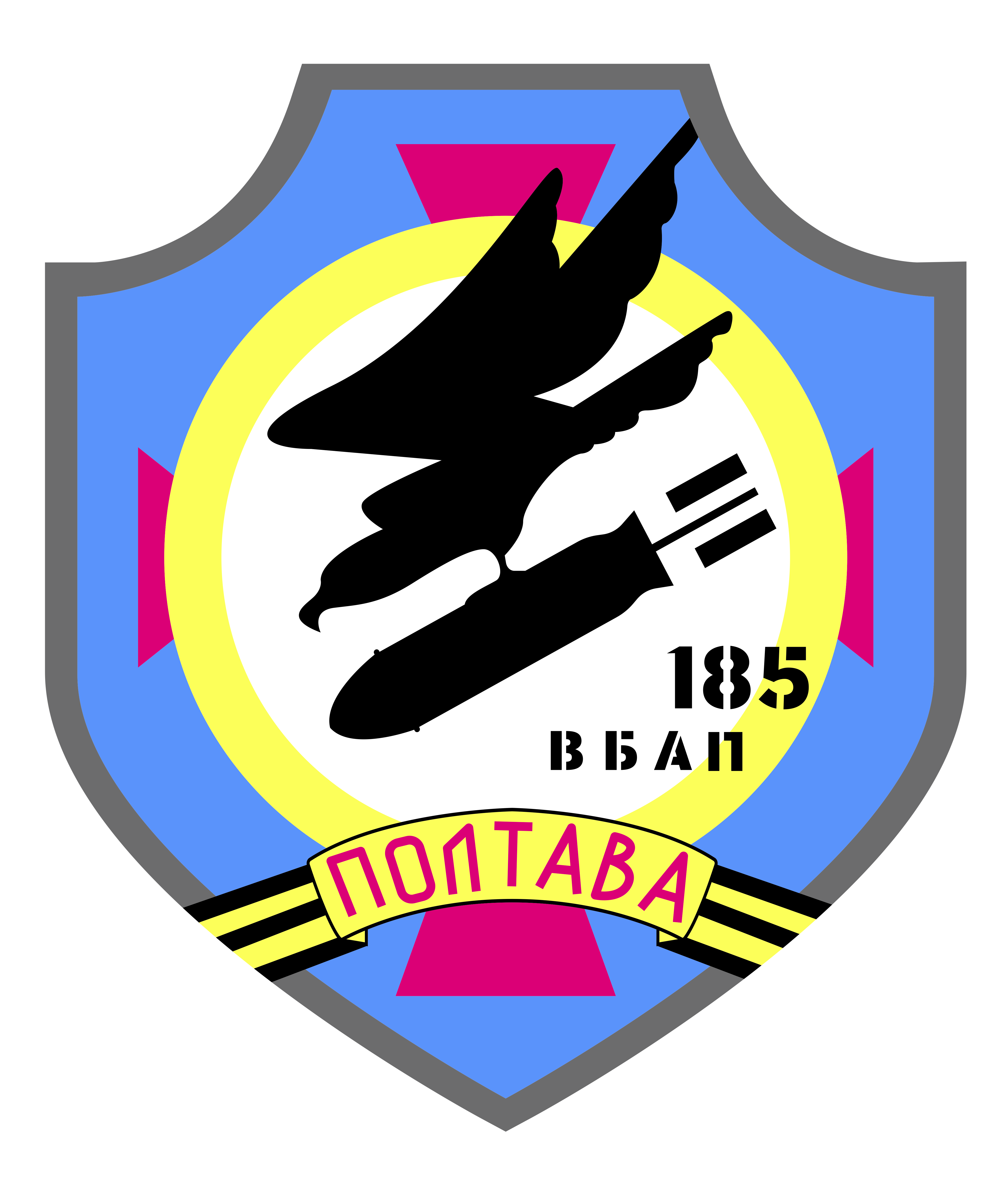 Ємблема 185-й ВБАП. Полтава. Розміщена на бомбардувальнику Ту-22М3 57 червоний. Зберігається у колекції Державного музею авіації у Києві. "Dmytro Sergienko Digital Museum of ukrainian history"